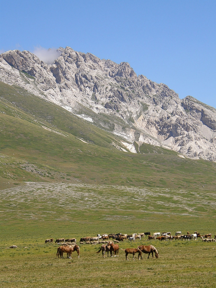 Campo Imperatore